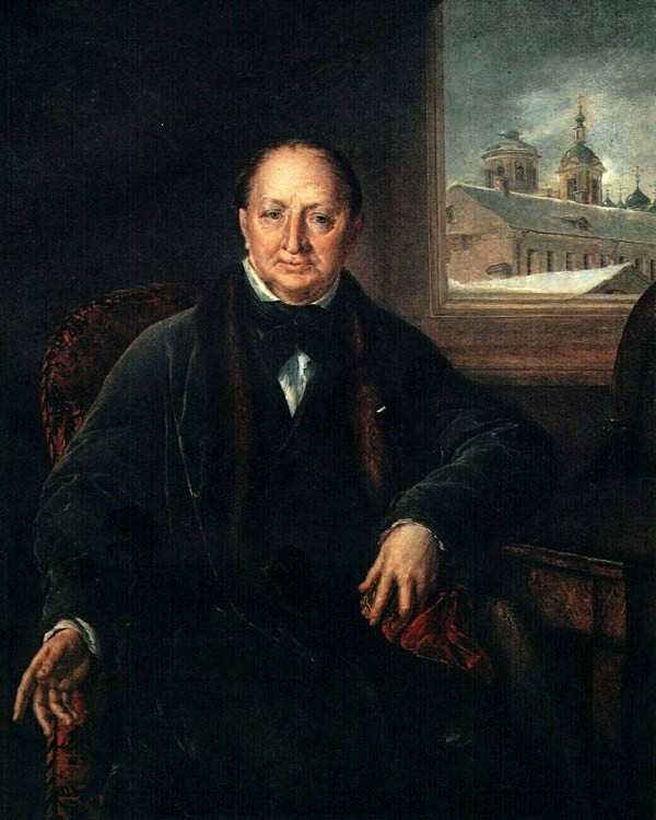 Протасьев Михаил Федорович (1840-е)